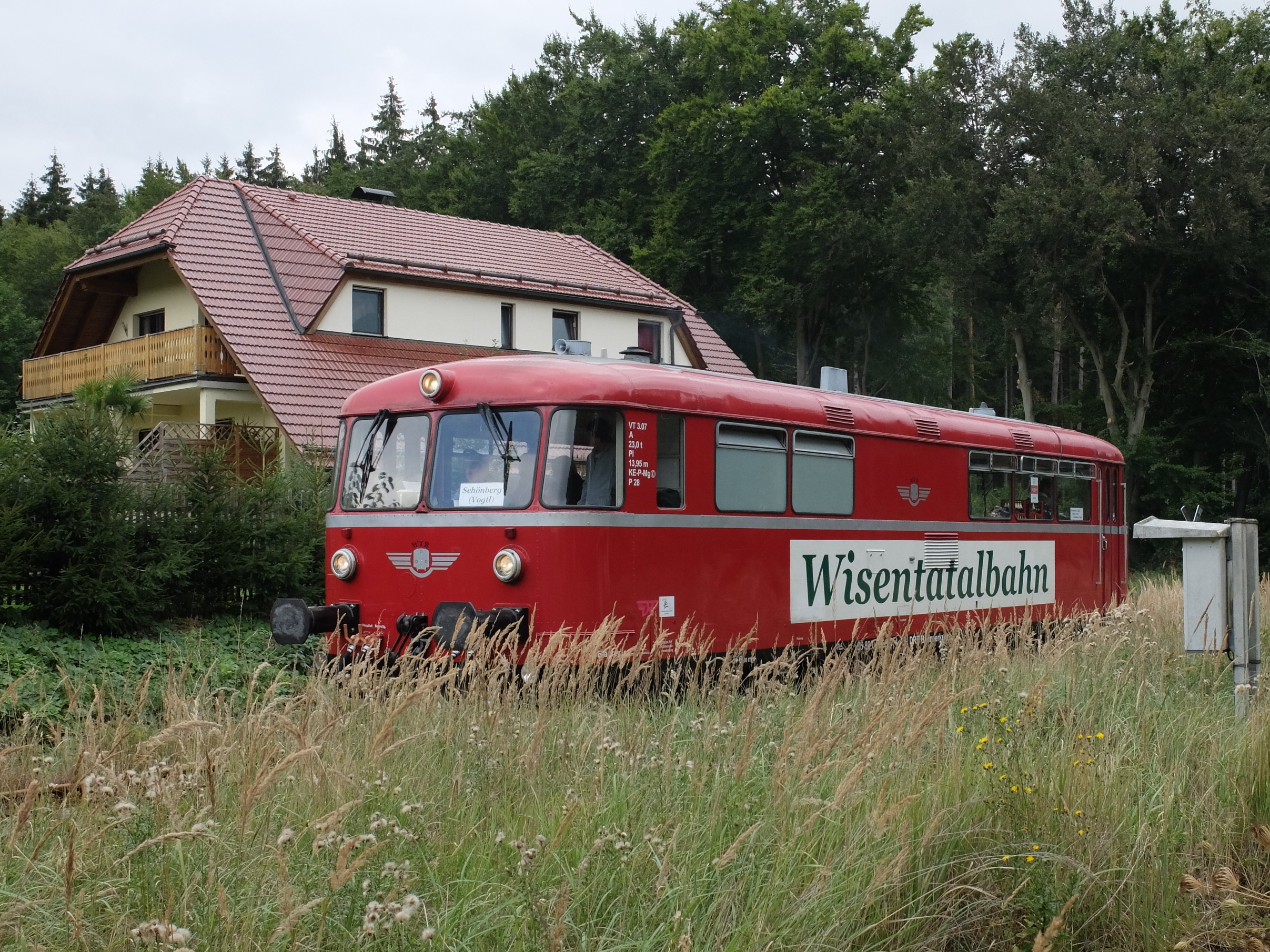 Triebwagen 798 307 der Wisentatalbahn erreicht den Haltepunkt Langenbuch